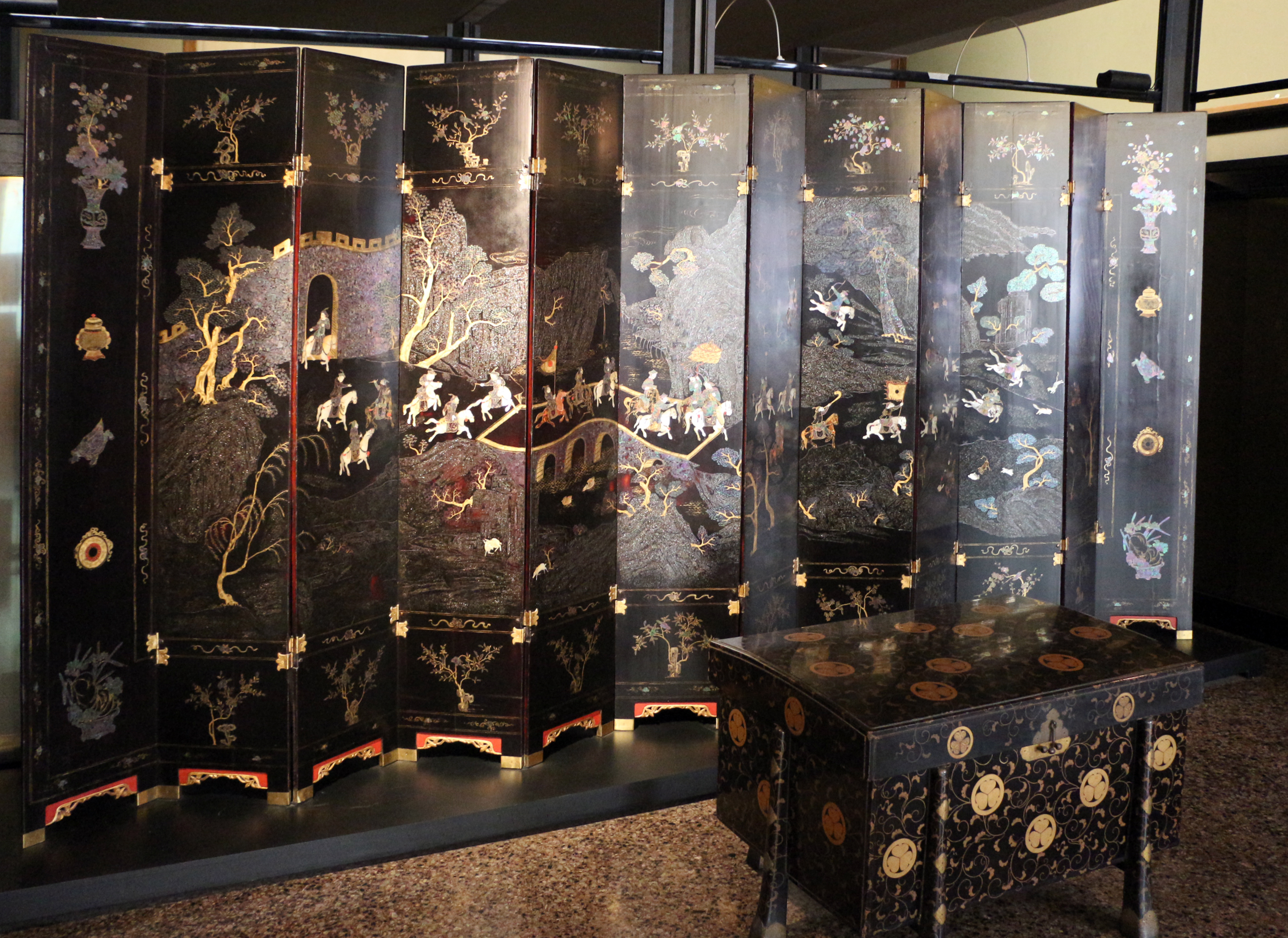 Museo d'Arte Orientale This is a photo of a monument which is part of cultural heritage of Italy.